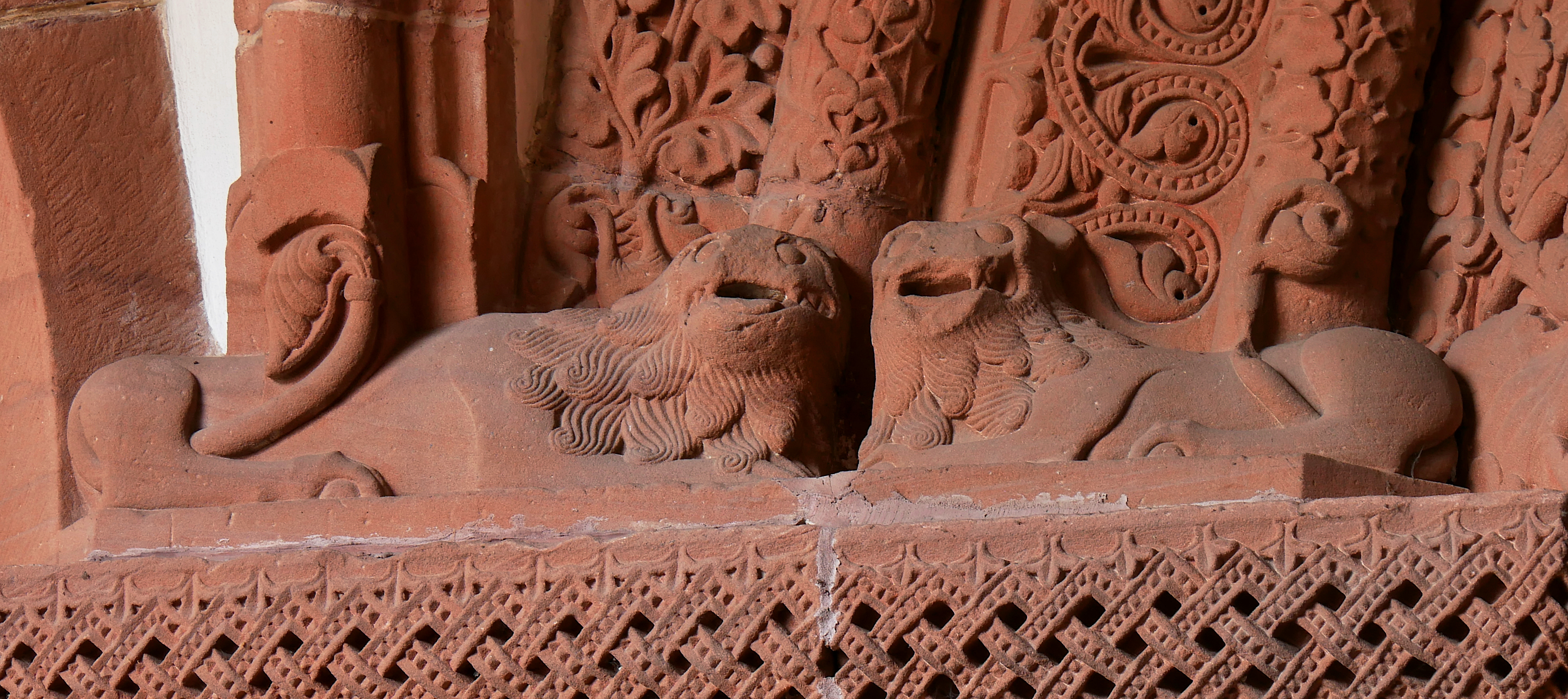 Ehemalige Prämonstratenserinnenklosterkirche St. Norbert in Enkenbach (Pfalz) - Löwen links vom Typmpanon